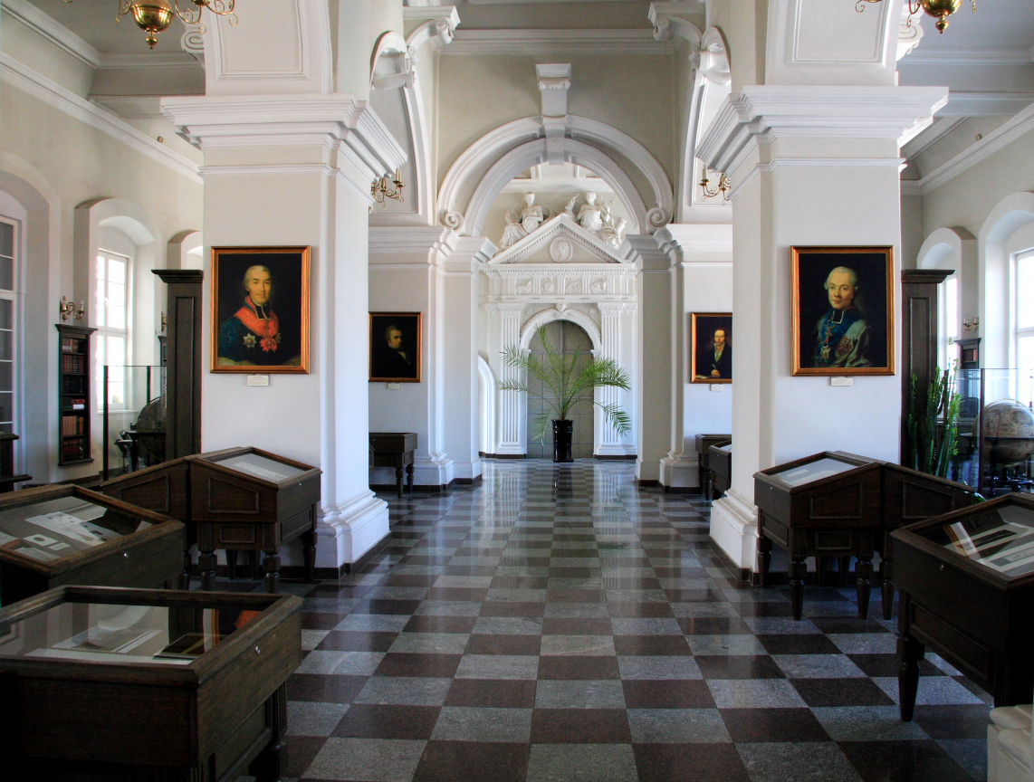 VU bibliotekos baltoji salė